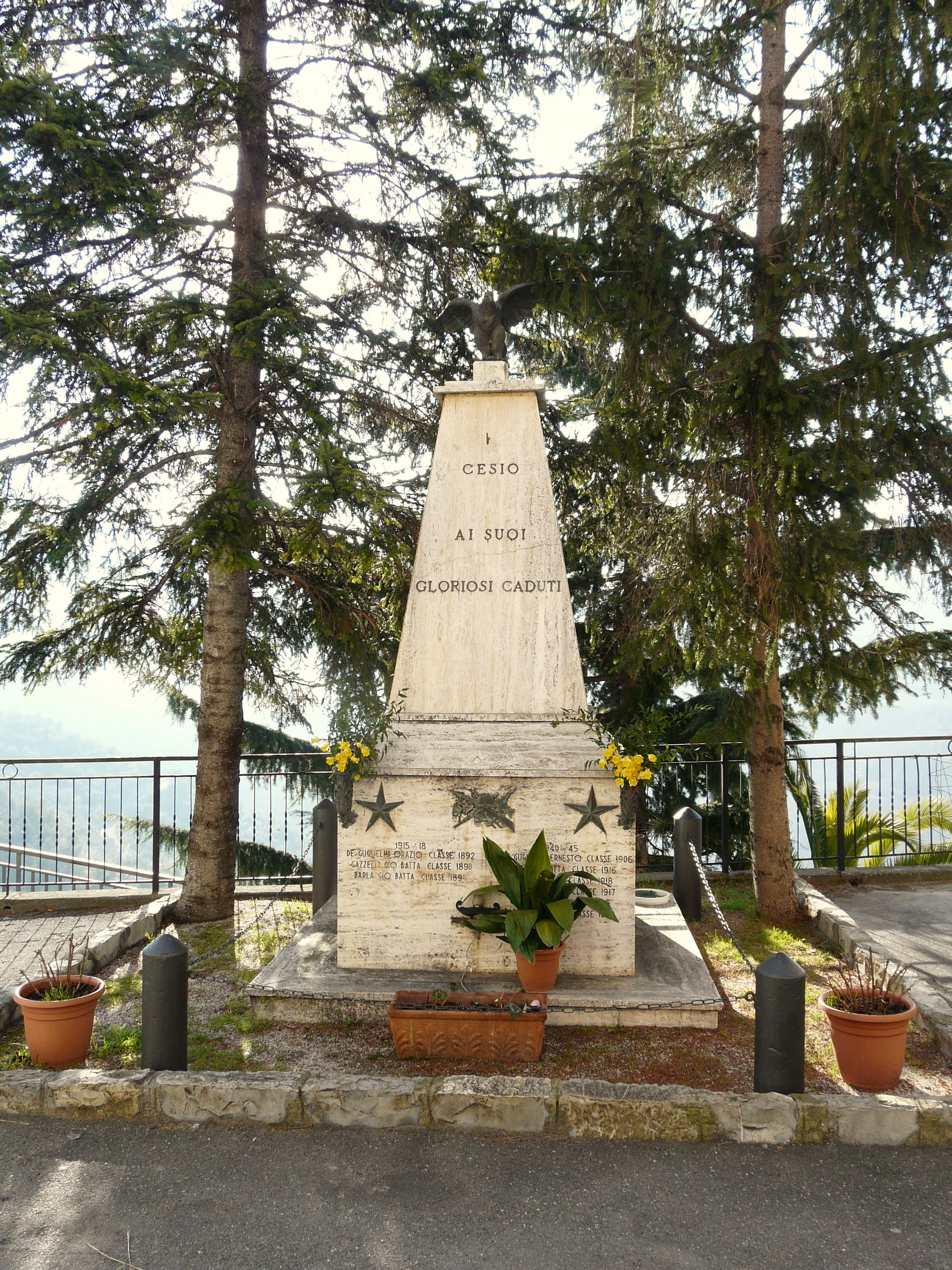 Monumento ai caduti, Cesio, Liguria, Italia